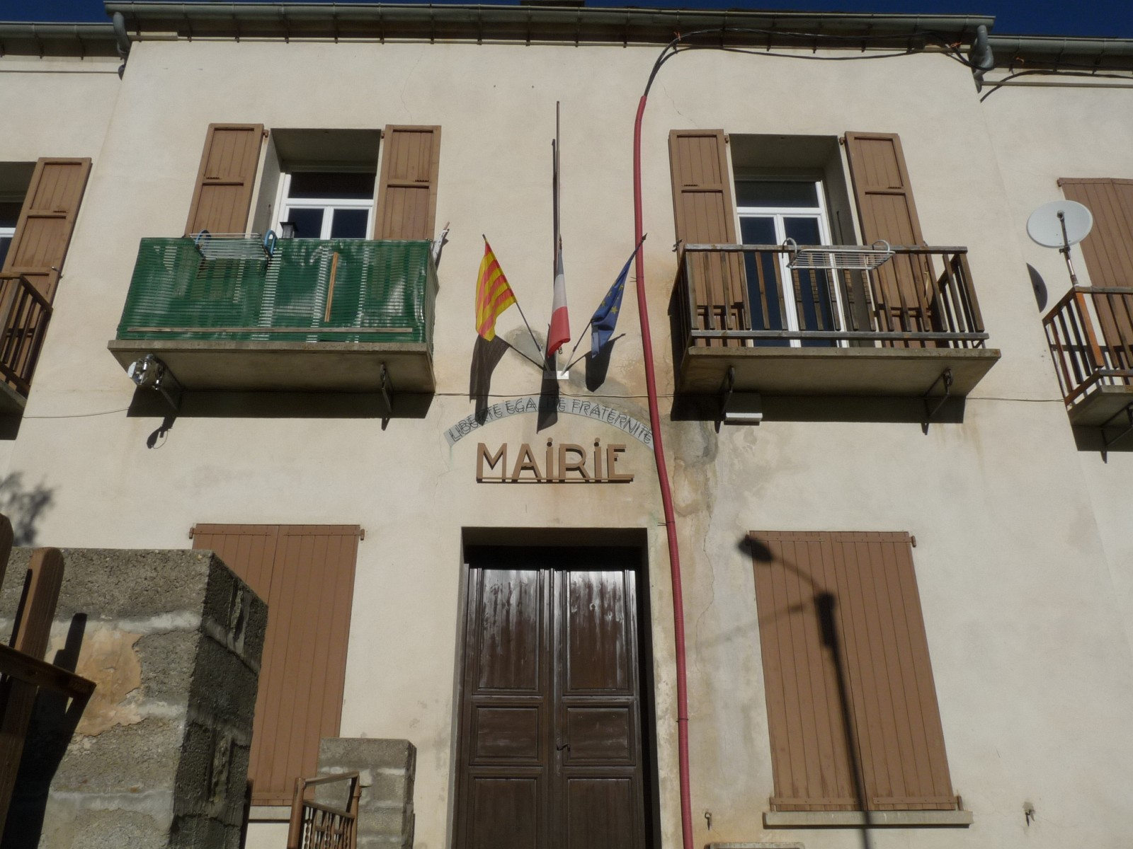 Mairie de Fontpédrouse, Pyrénées-Orientales, France